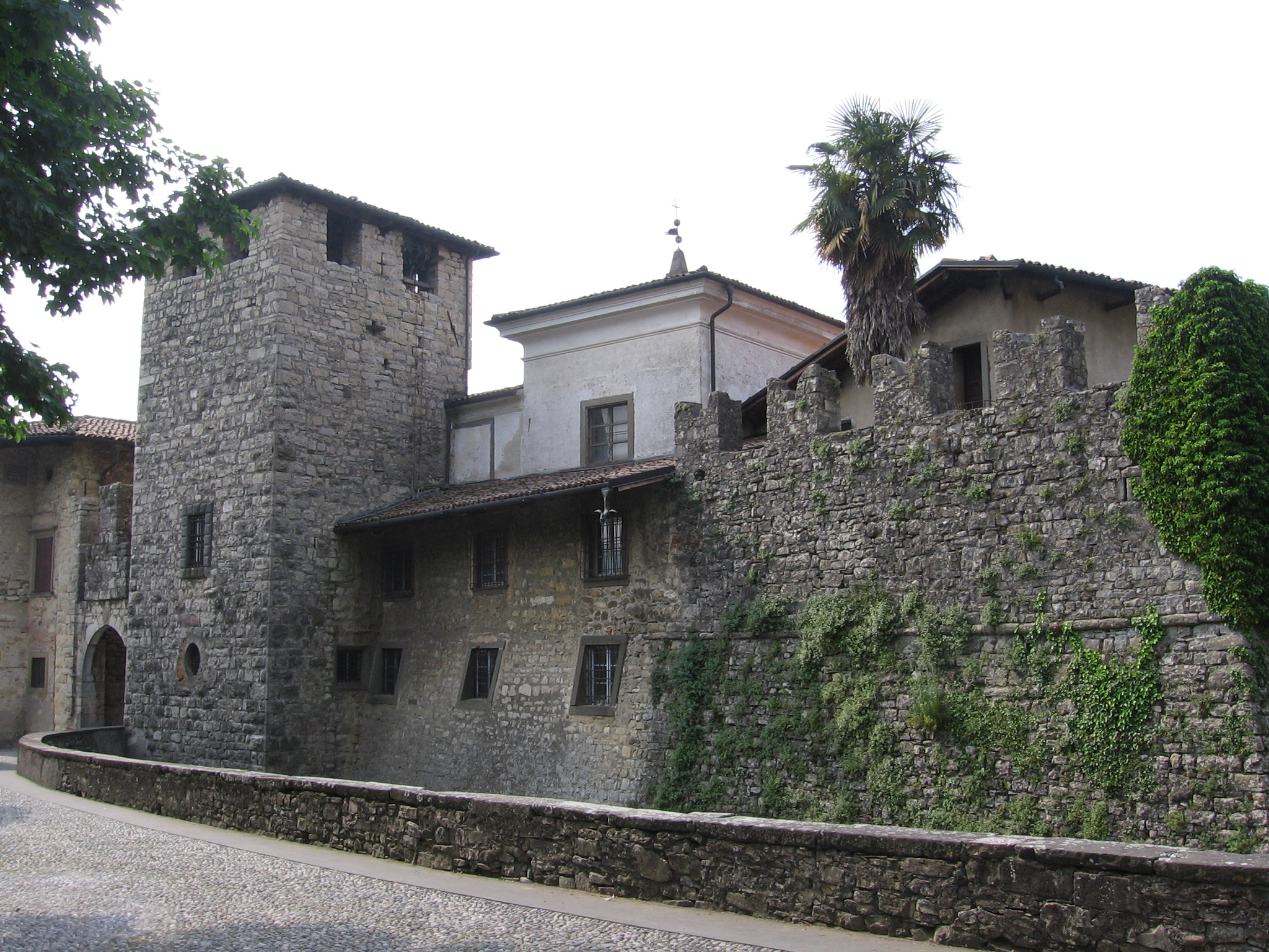 Castel de' conti Calepio, Castelli Calepio, Bergamo, Italia